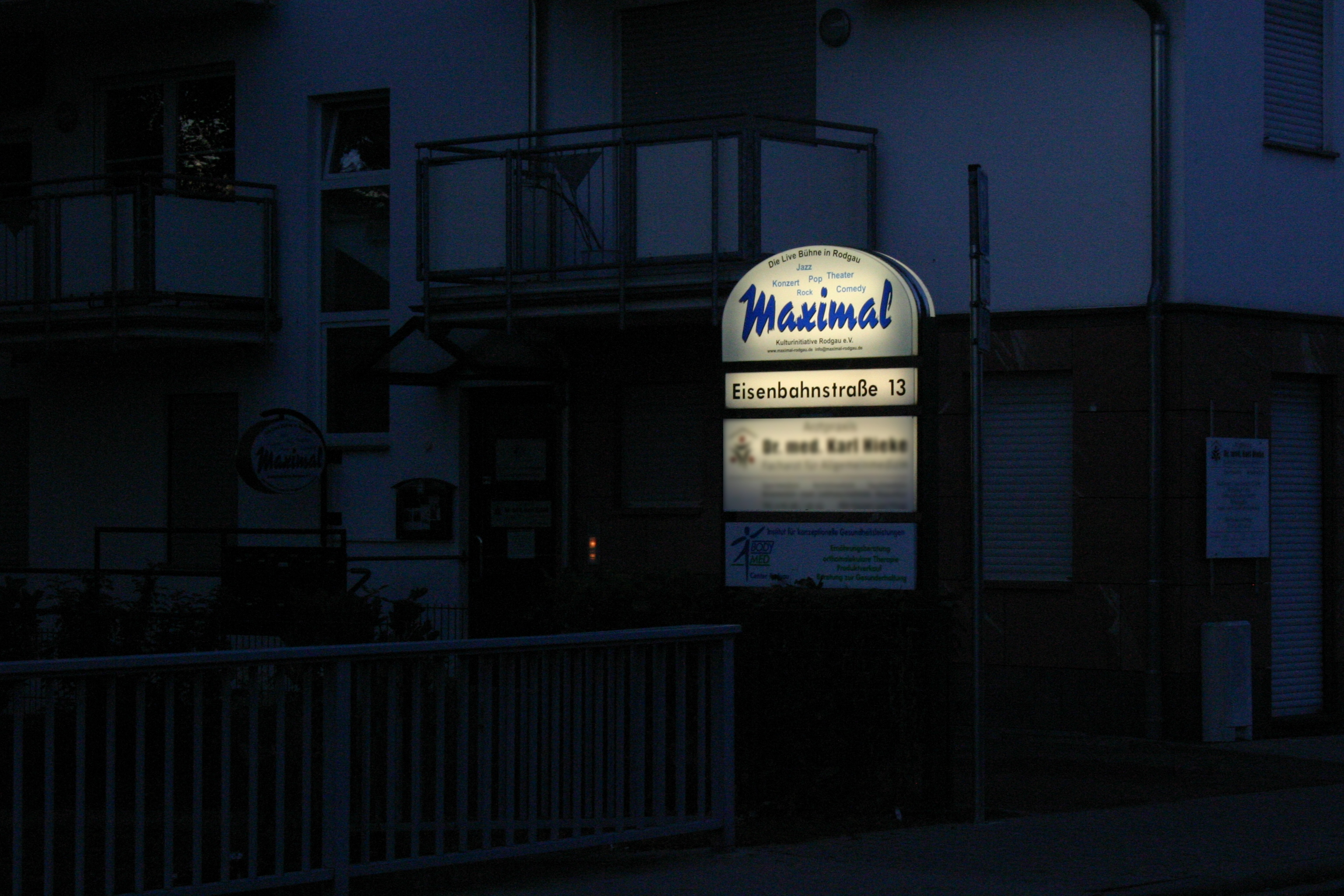 Leuchtschild der Maximal Kulturinitiative in der Eisenbahnstraße 13 in 63110 Rodgau